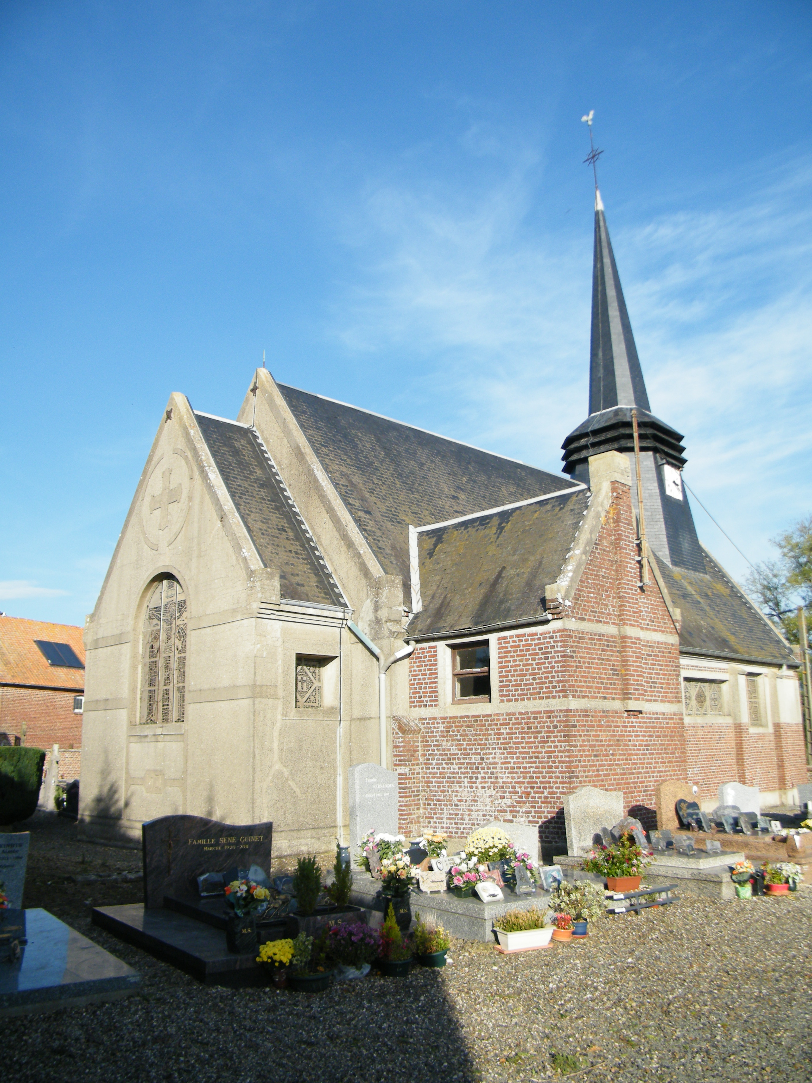 église.